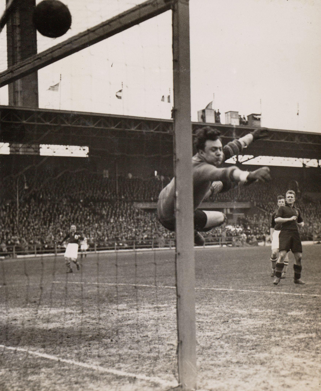 Nationaal Archief Beschrijving: De Belgische doelman Vandeweijer is kansloos. Nederland - België (9-3), gespeeld op 11 maart 1934 in het Olympisch Stadion te Amsterdam. Datum: 11 maart 1934 Vervaardiger: fotograaf onbekend Bestanddeelnummer: 3929 URL: [1] Voor meer informatie over het Nationaal Archief: Voor meer foto's uit deze en andere collecties, bezoek onze Beeldbank:, U kunt ons helpen onze kennis van de fotocollecties te verrijken door tags en commentaren toe te voegen. Herkent u mensen of locaties of heeft u een bijzonder verhaal te vertellen bij één van de foto's, laat dan een reactie achter (als u ingelogd bent bij Flickr) of stuur een mailtje naar